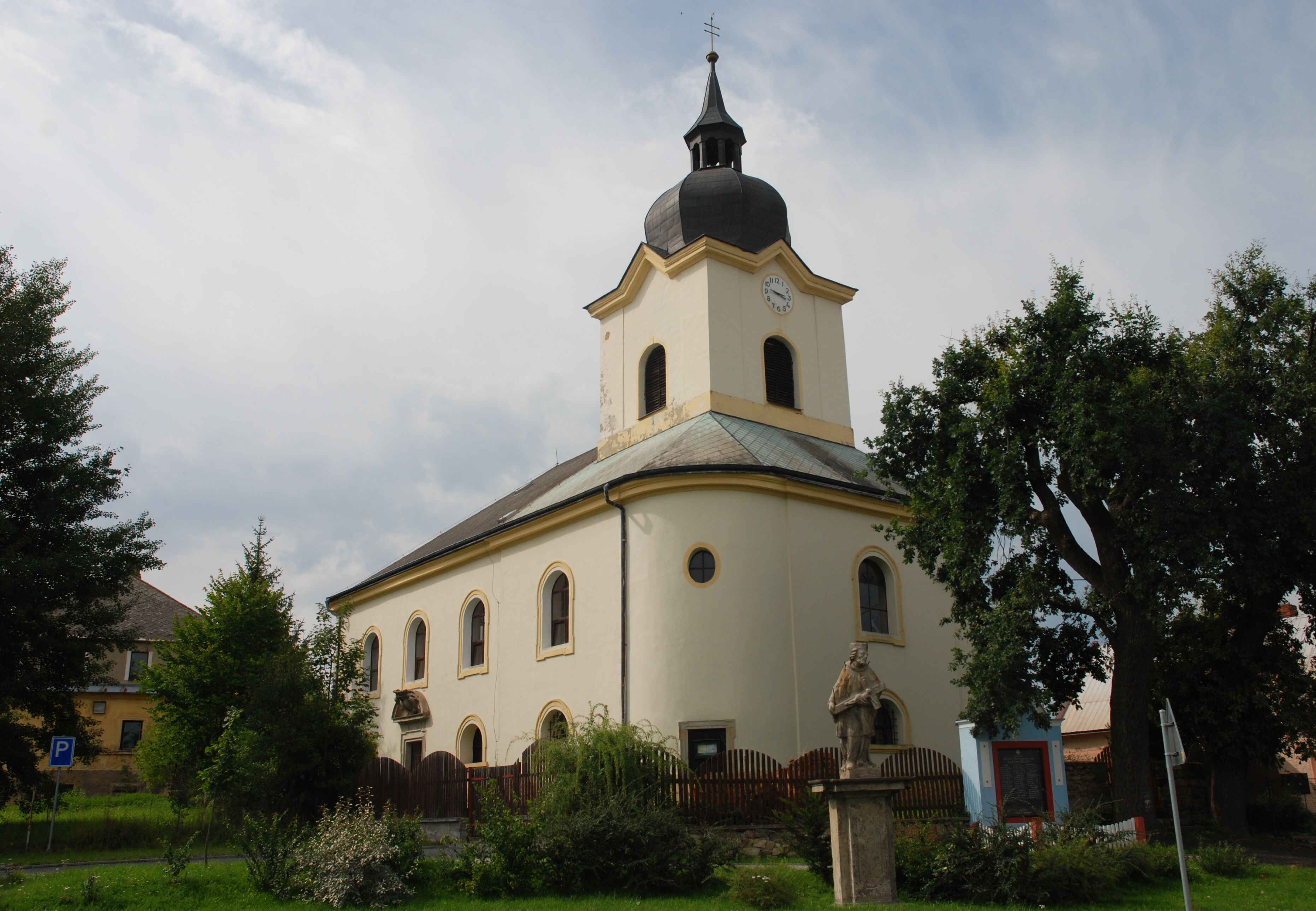 Tisová